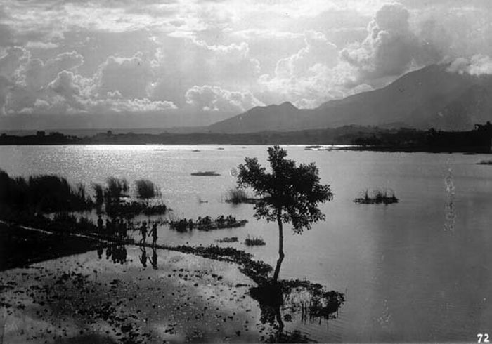 Foto. Het meer van Bagendit.